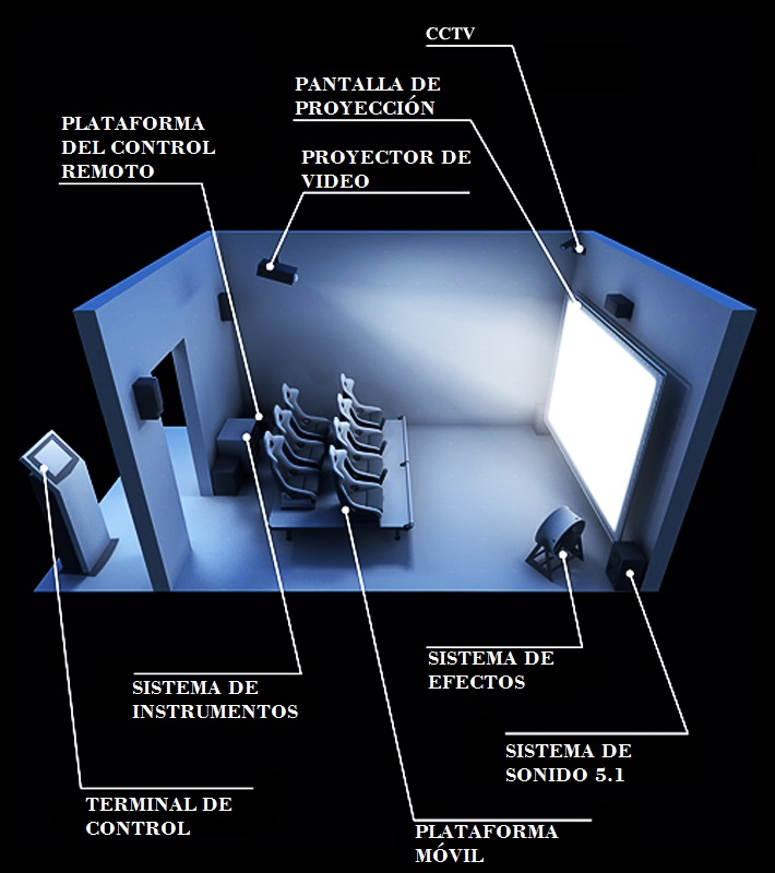 Diagrama de un teatro 4D con pantalla 2D